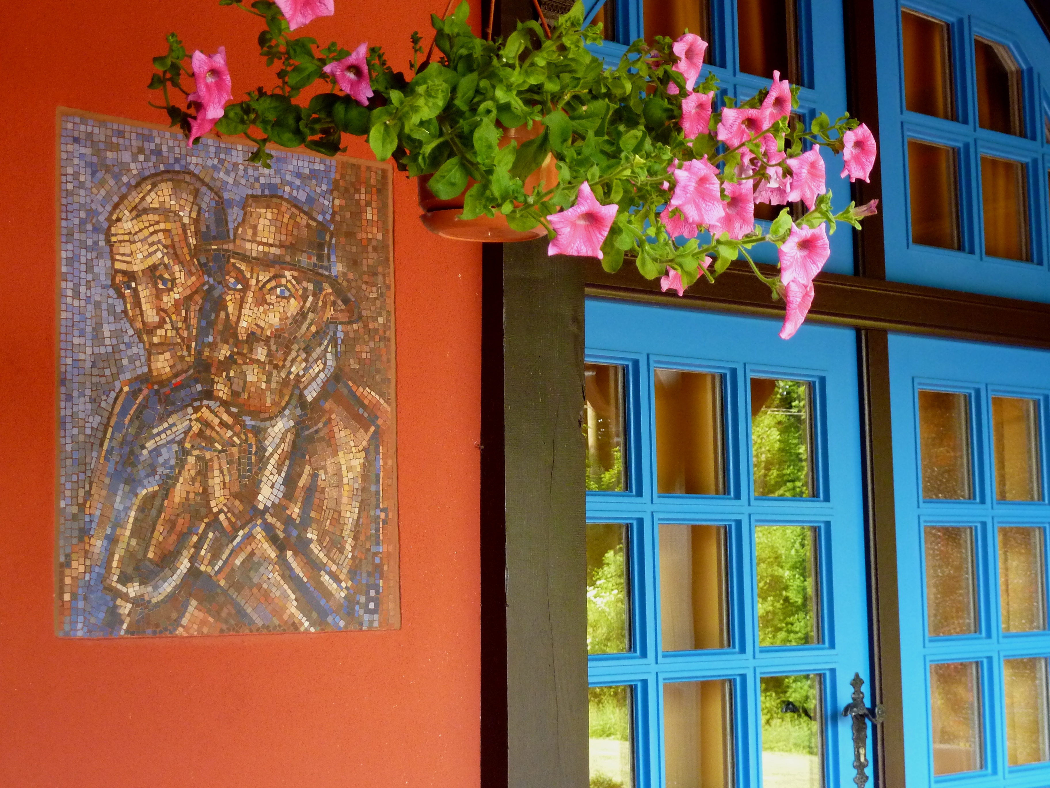 Die rote Fassade des Böckstiegel-Haus in Werther (Westfalen) hat der Expressionist Peter August Böckstiegel mit einem wunderschönen Mosaik versehen, dass Nachbarn des Künstlers zeigt.